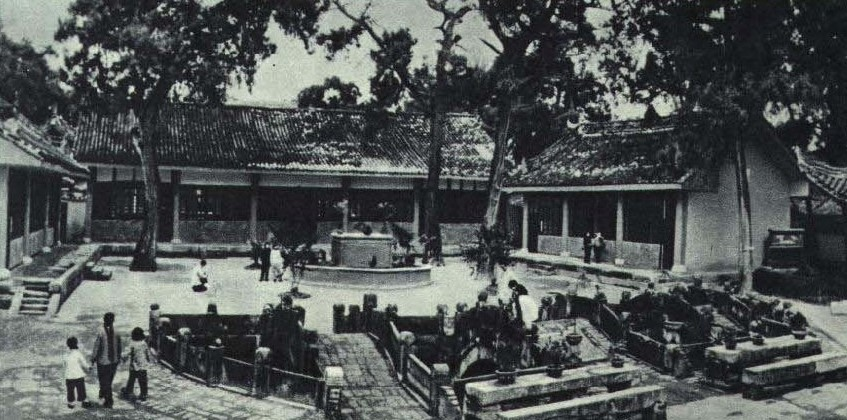 1963-01 1963年 黄继光纪念馆